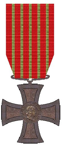 Portugees Oorlogskruis